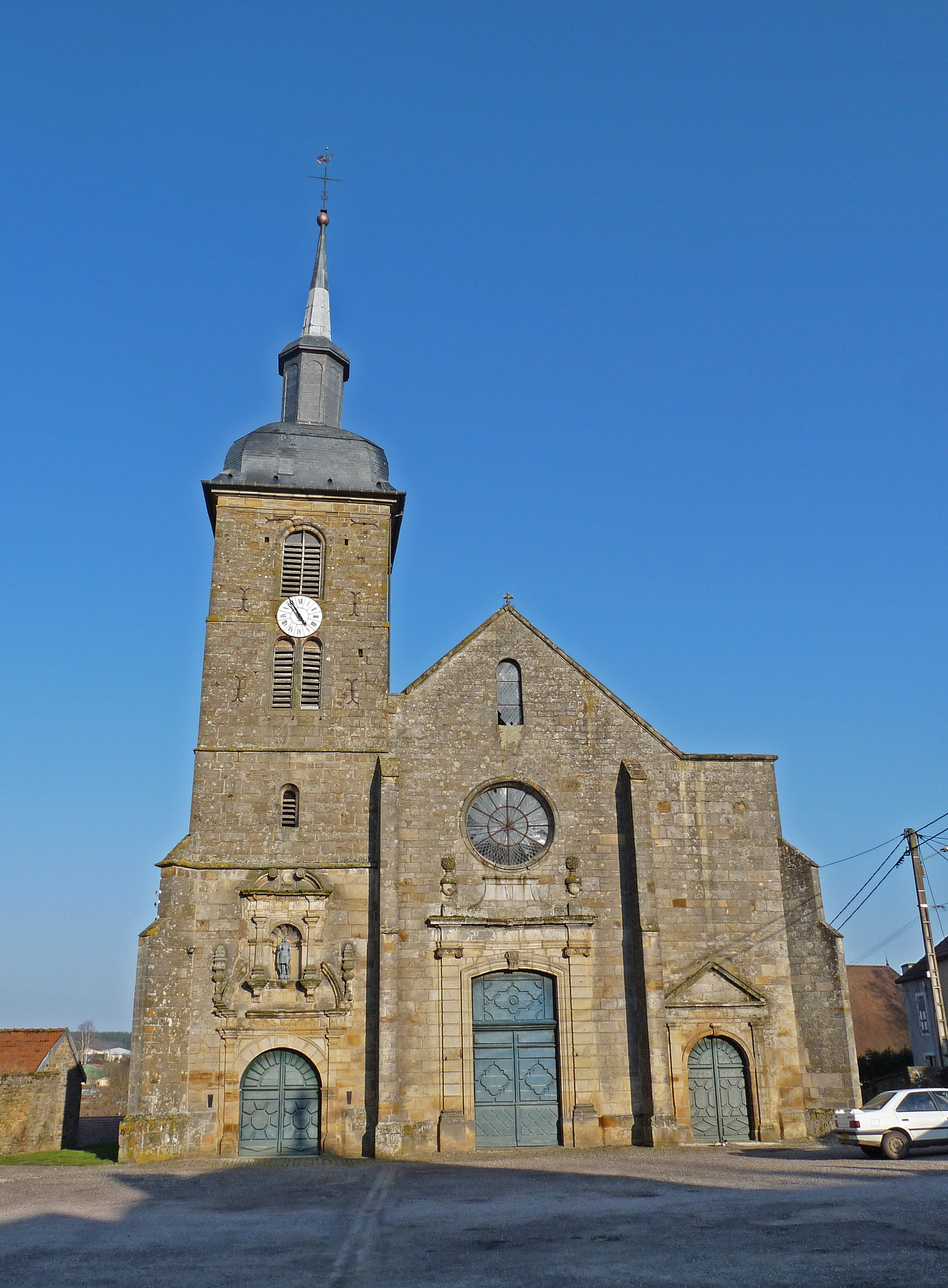 Eglise de Bussières-lès-Belmont (Haute-Marne)